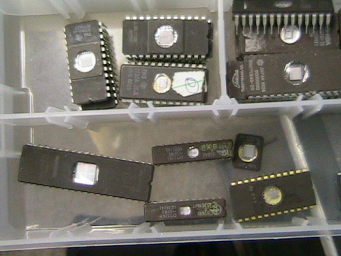 Encontrada na EN sob Domínio Publico [1]